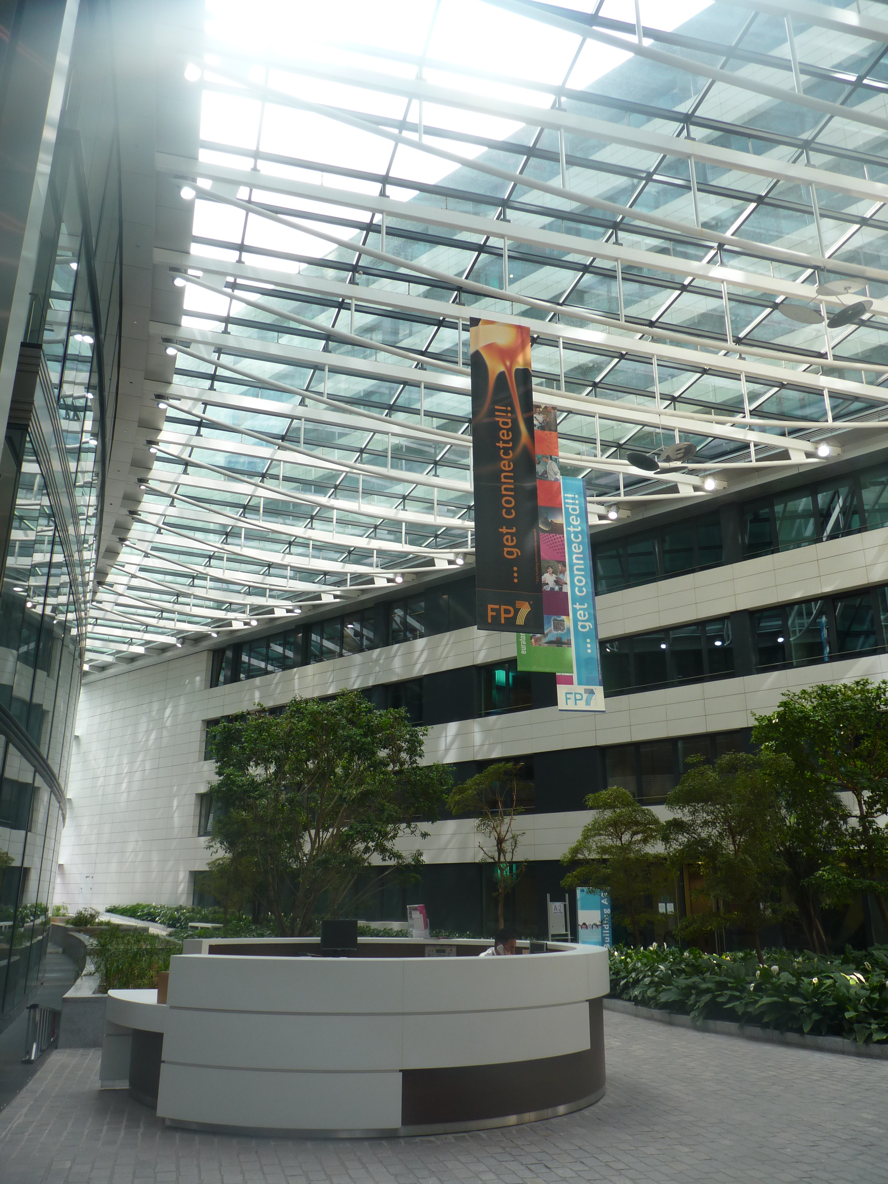 Covent Garden, Bruxelles